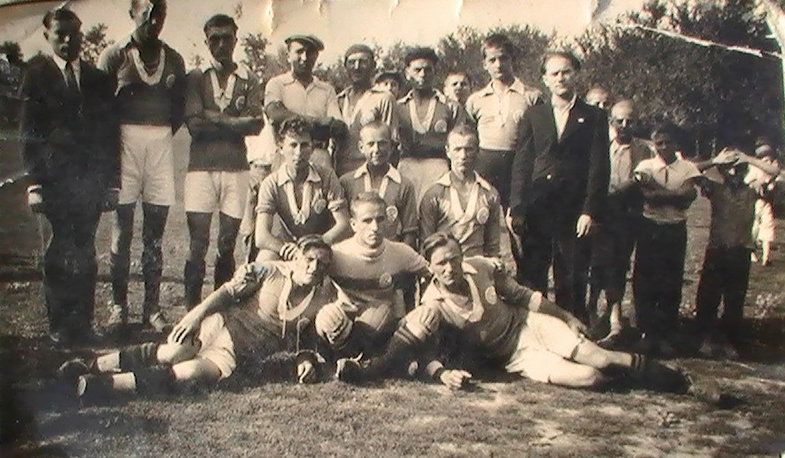 FK Plavi Dunav from 1930's, oldest known photo. Bottom row: Komáromi Imre, Fazekas Antal, Urbán István Midle: unkn, Komaromi János, unkn. Top